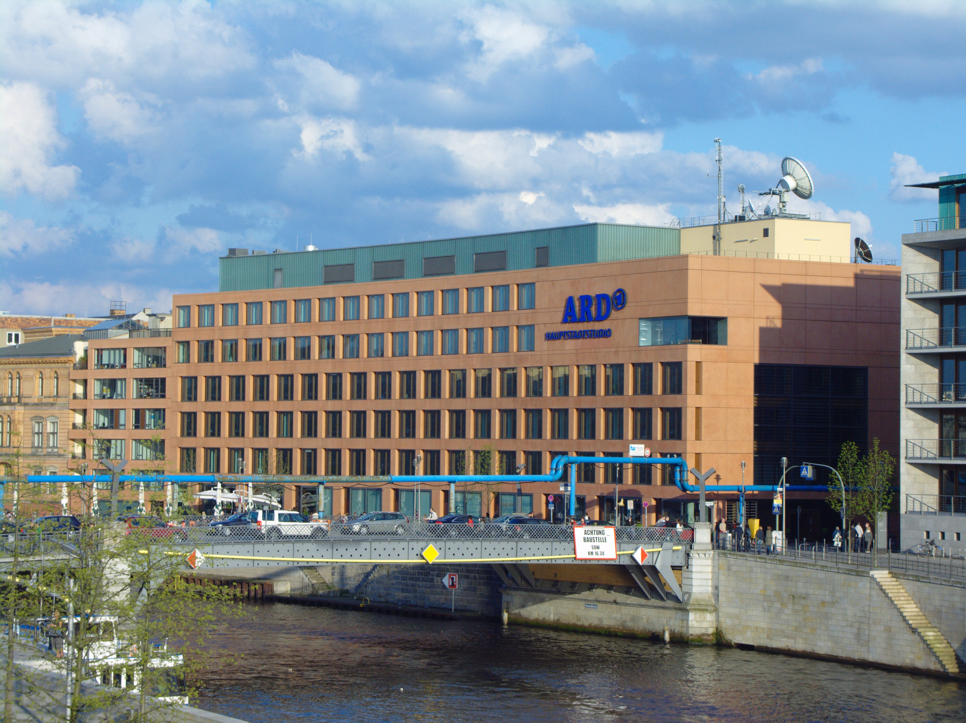 ARD-Hauptstadtstudio in Berlin am Spreeufer (Reichstagufer Ecke Wilhelmstraße), aufgenommen aus nordwestlicher Richtung von der Treppe des Marie-Elisabeth-Lüders-Hauses